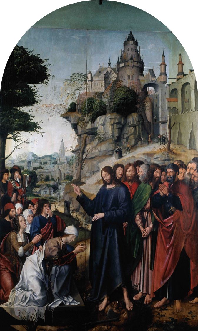 A Ressurreição de Lázaro por Jorge Afonso. Uma das pinturas da Charola do Convento de Cristo, Tomar, Portugal pintadas depois de 1510.